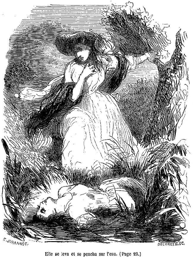 Illustration de Tony Johannot pour une réédition du roman "Indiana" de George Sand chez Hetzel (Paris) en 1861. Indiana découvre le cadavre de sa servante Noun flottant dans la rivière de son domaine de Lagny. "Elle se leva et se pencha au-dessus de l'eau." Illustration d'un passage figurant à la page 23 de cette édition (première partie, chapitre 8).